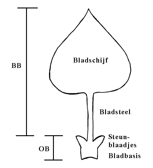 Blattgliederung/Parts of a leaf. NL-txt BB = Bovenblad; OB = Onderblad